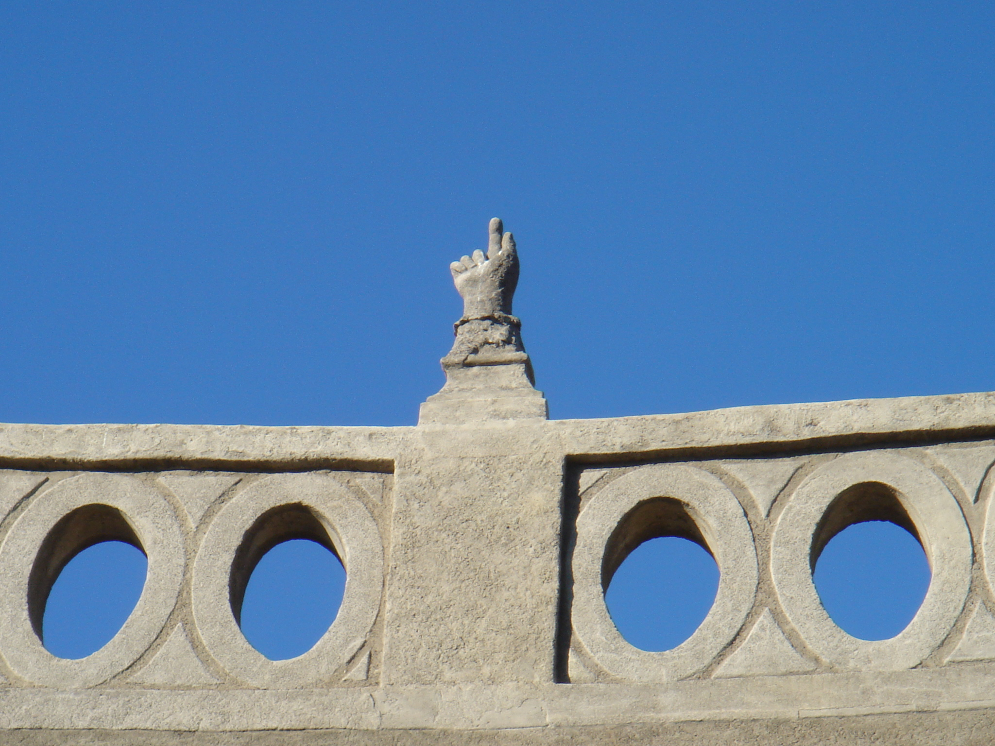 Roma, via dei Cerchi. Il cosiddetto "dito di Cicerone" sull'attico del casale di via dei Cerchi.